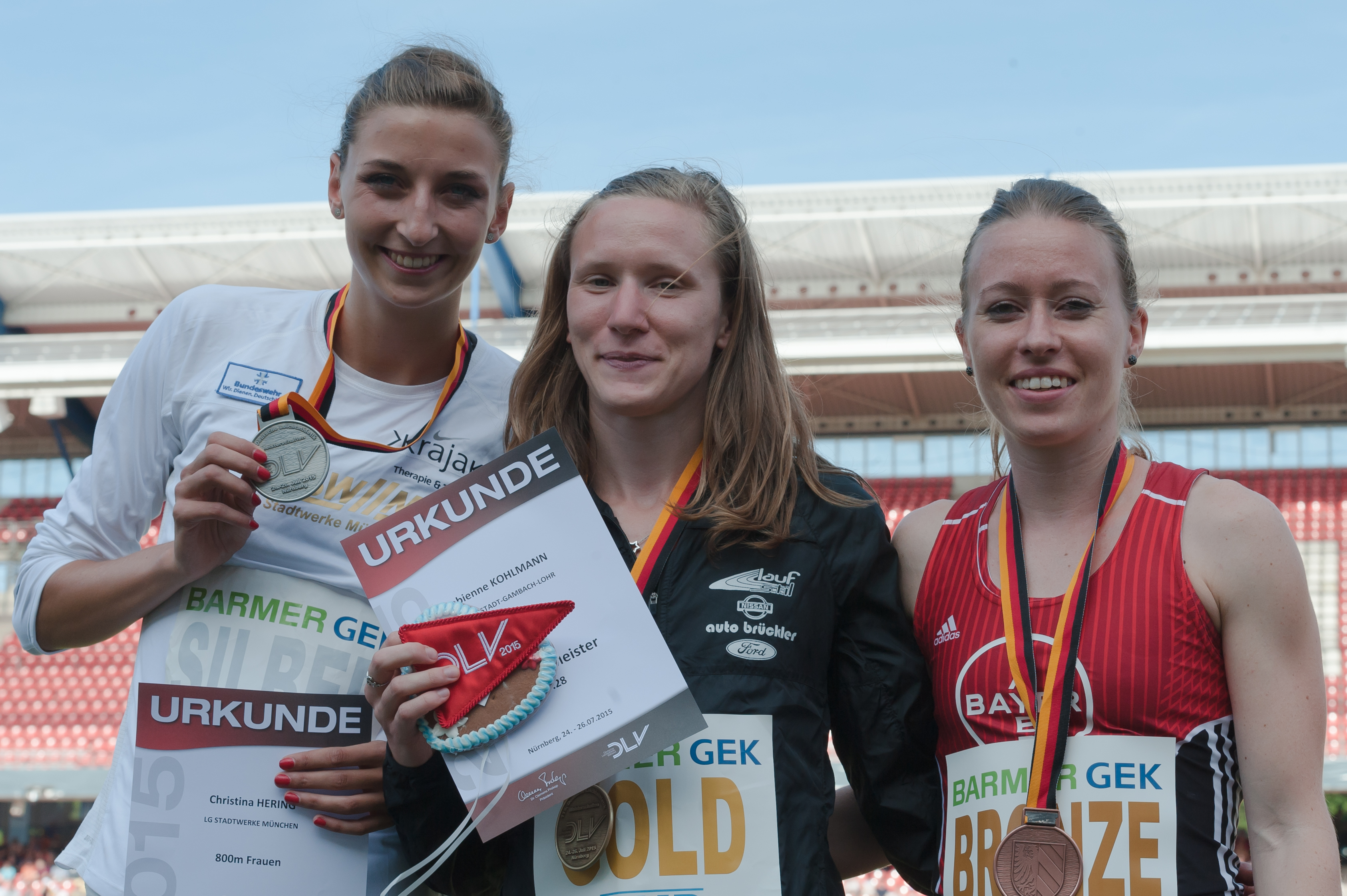 Deutsche Leichtathletik-Meisterschaften 2015: Frauen 800m - Fabienne Kohlmann, Christina Hering, Carolin Walter